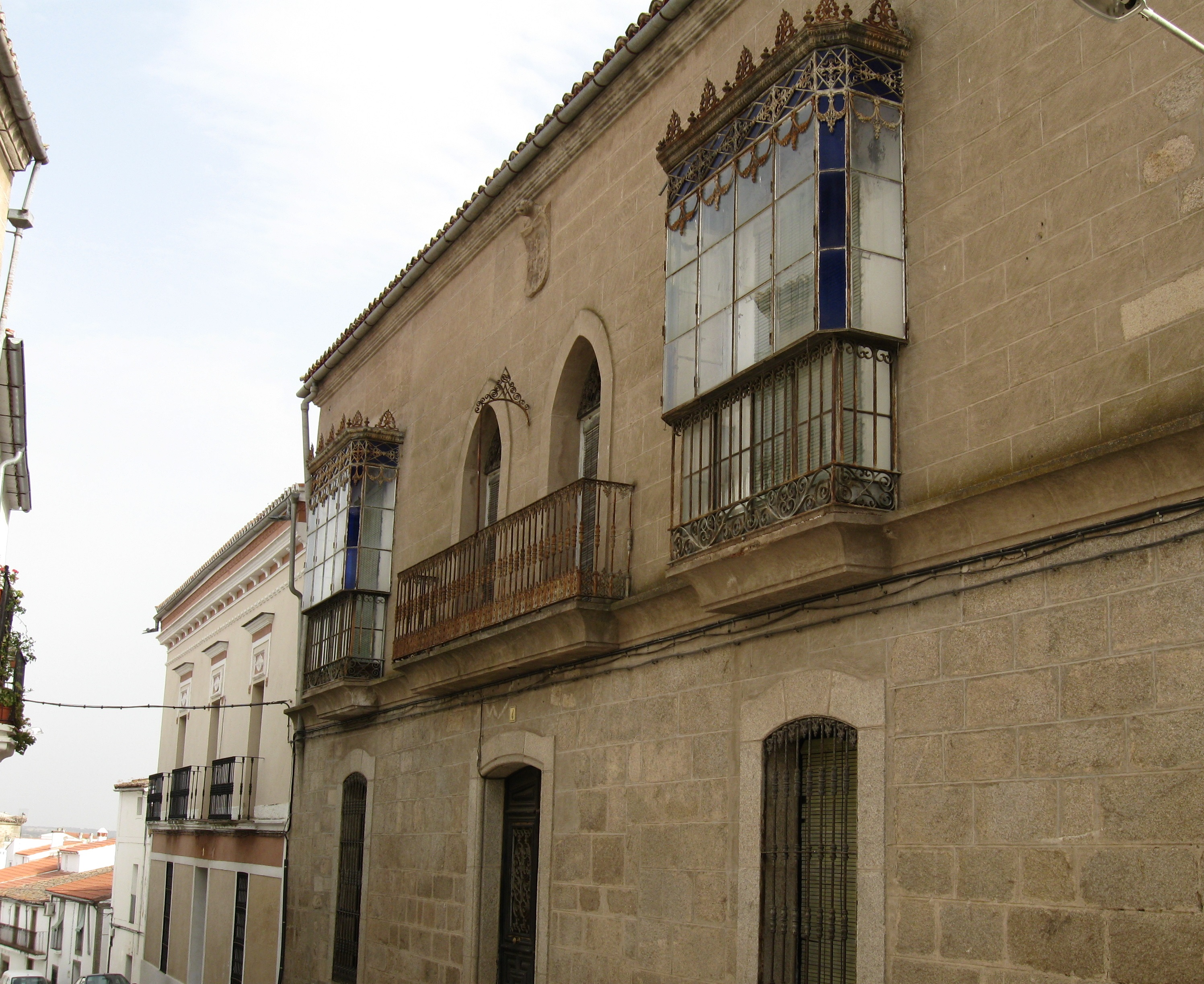 Casa Palacio del Capitán Lizaur, Brozas, provincia de Cáceres, España.